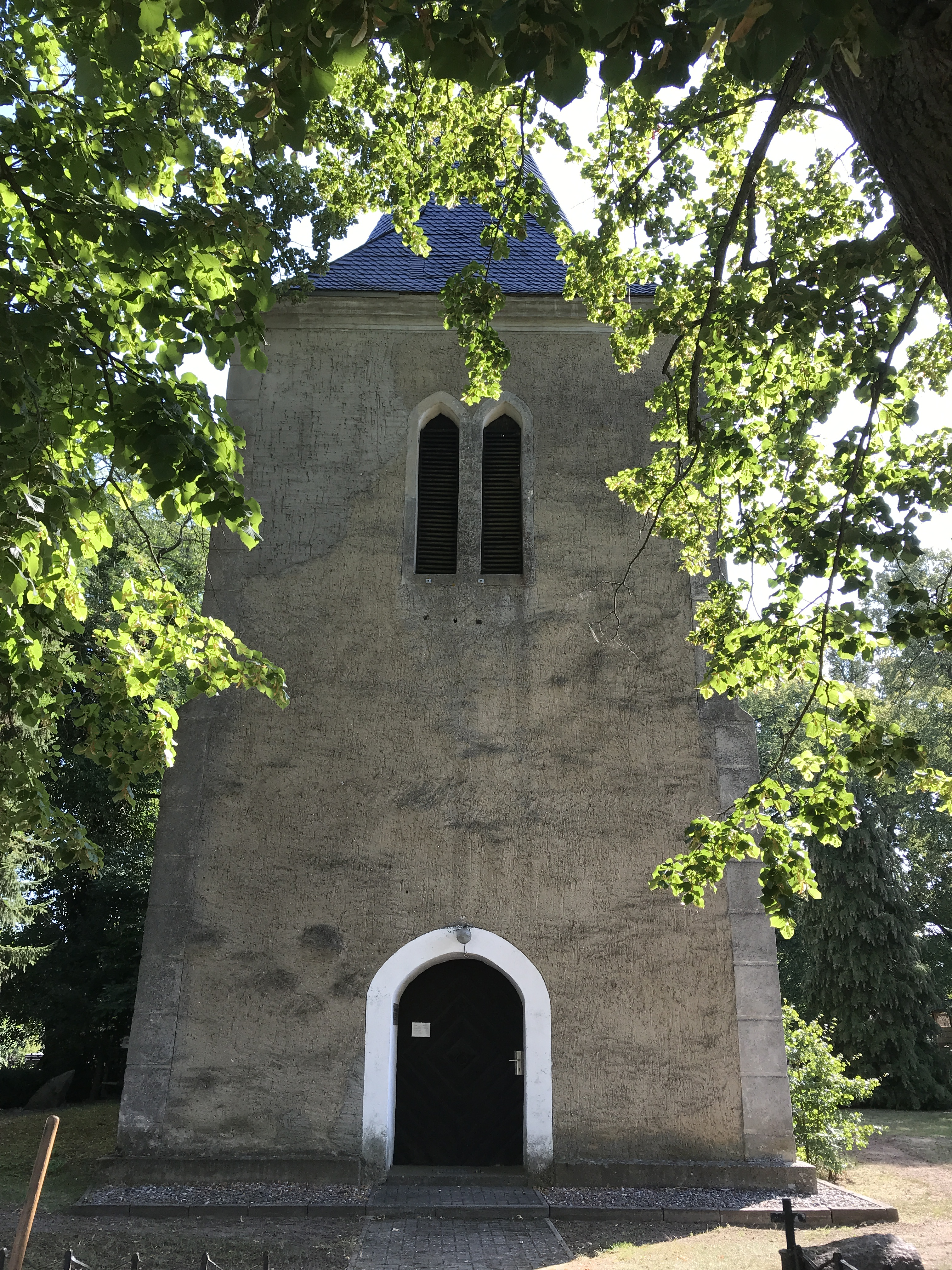 Die Kirche Groß Spiegelberg ist eine verputzte Feldsteinkirche in Groß Spiegelberg, einem Ortsteil der Gemeinde Jatznick im Landkreis Vorpommern-Greifswald in Mecklenburg-Vorpommern. Im Innern steht unter anderem ein Kanzelkorb aus dem 18. Jahrhundert.